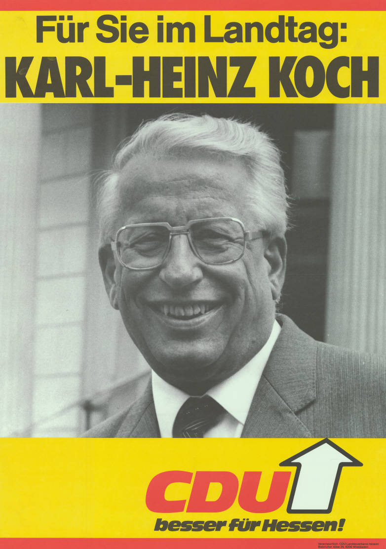 Für Sie im Landtag: Karl Heinz Koch CDU besser für Hessen! Abbildung: Porträtfoto Plakatart: Kandidaten-/Personenplakat mit Porträt Auftraggeber: Verantw.: CDU-Landesverband Hessen, Wiesbaden Objekt-Signatur: 10-007 : 581 Bestand: Landtagswahlplakate Hessen (10-007) GliederungBestand10-18: Landtagswahlplakate Hessen (10-007) » CDU Lizenz: KAS/ACDP 10-007 : 581 CC-BY-SA 3.0 DE